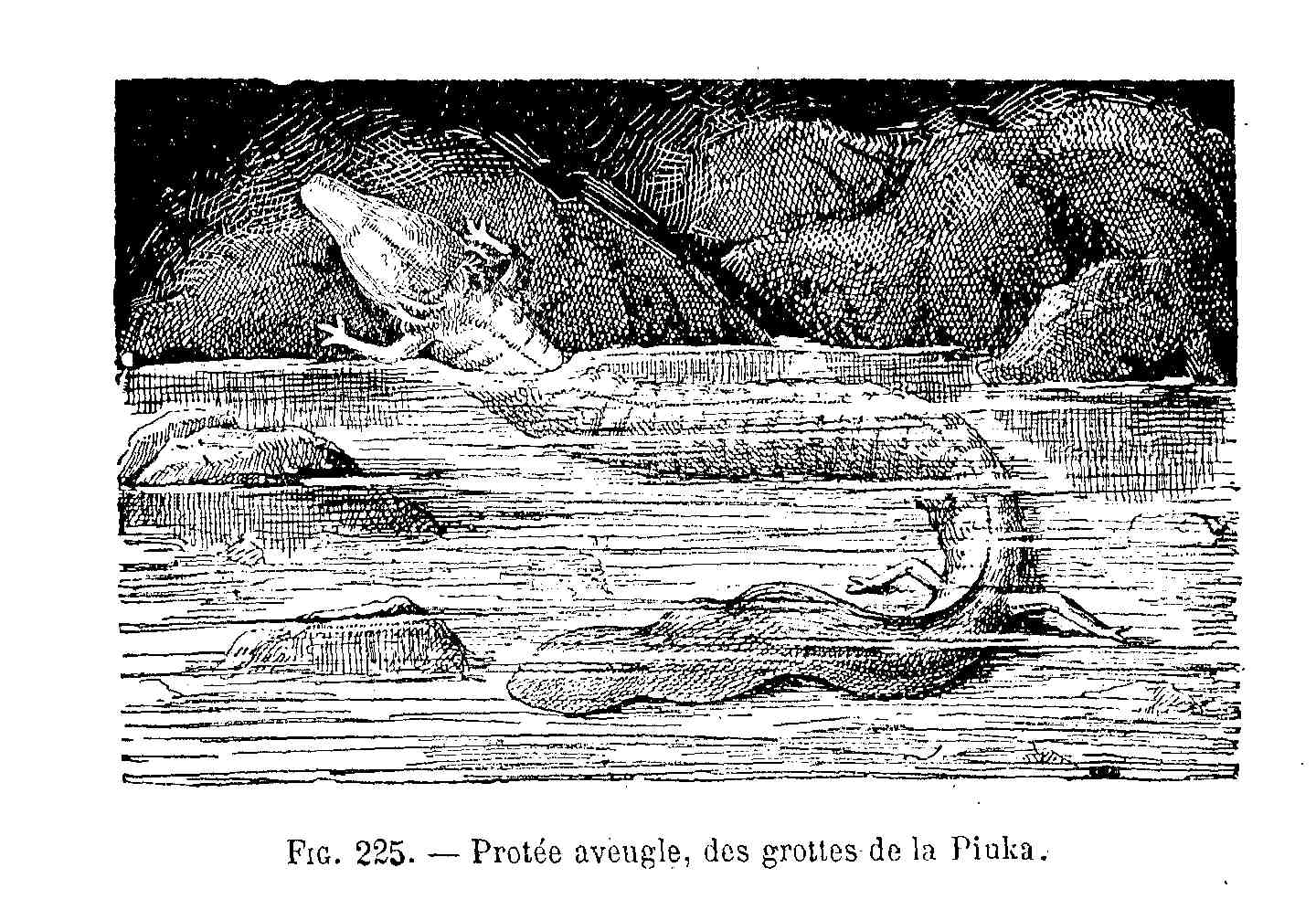 Protée aveugle (dessin)